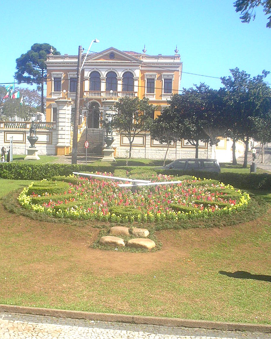 Relógio das Flores, com o Palácio Garibaldi ao fundo. Localiza-se no setor histórico de Curitiba, (Paraná, Brasil), no Largo da Ordem.